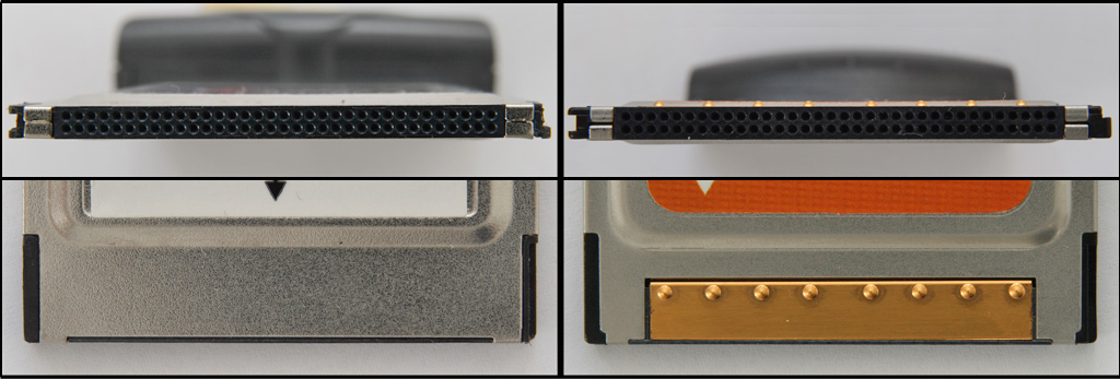 Vergleich einer PCCard16-Karte (links) mit einer CardBus-Karte (rechts). Die CardBus-Karte besitzt auf der Oberseite einen goldenen Kontaktstreifen und ist an der rechten Stirnseite durch eine kleinere Aussparung für eine Betriebsspannung von 3.3V kodiert. Die große Aussparung an der rechten Stirnseite der PCCard16 kodiert diese für eine Betriebsspannung von 5V.